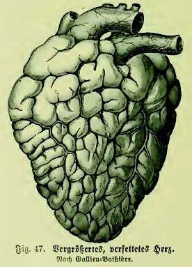 Fig. 47. Vergrößertes, verfettetes Herz. Nach Gallieu-Batßière